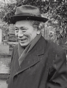 Der japanische Sprecher, Film- und Fernsehschauspieler Musei Tokugawa (1894–1971). 徳川夢声 (Musei Tokugawa, 1894–1971)